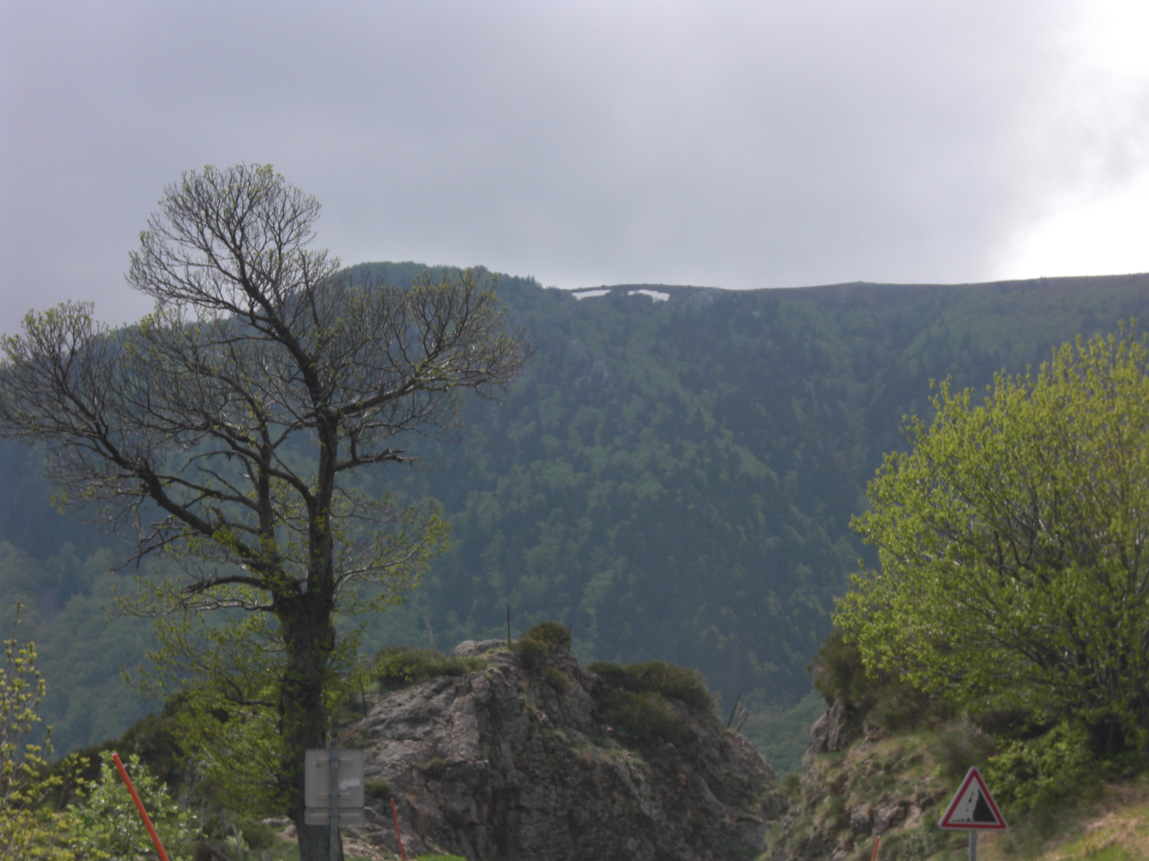 Dernières_neiges_du_Tanargue